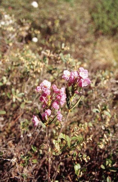 Kalmia polifolia 1-eheep